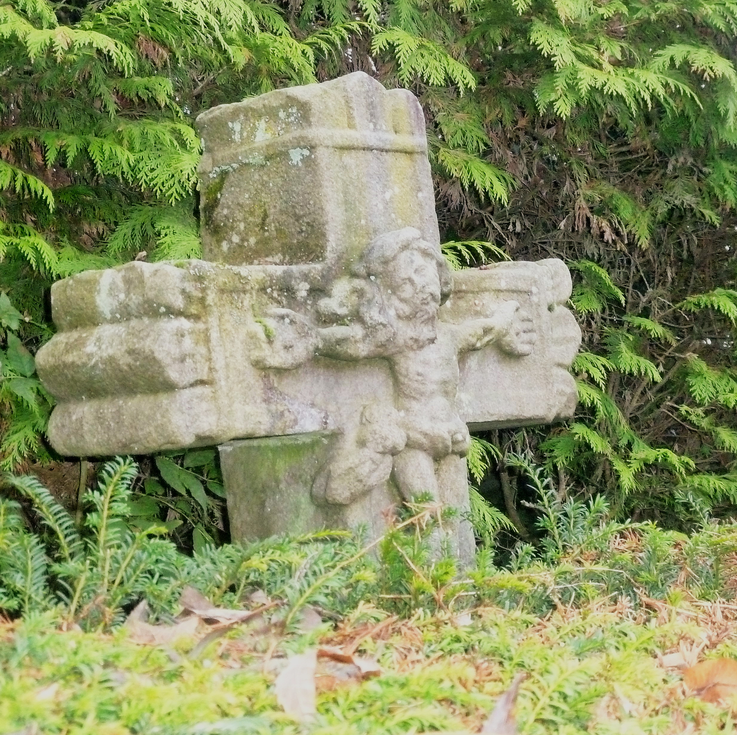 Croix datée de 1356 à Gruson, qui serait un des éléments du tombeau de Jacques de Lallaing Nord.- France.